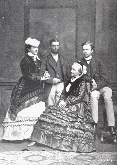 Elisabeth zu Wied, Karl Fürst von Rumänien (geb. Prinz von Hohenzollern-Sigmaringen), Marie Fürstin-Mutter zu Wied, Fürst Wilhelm zu Wied (Elisabeths Bruder)